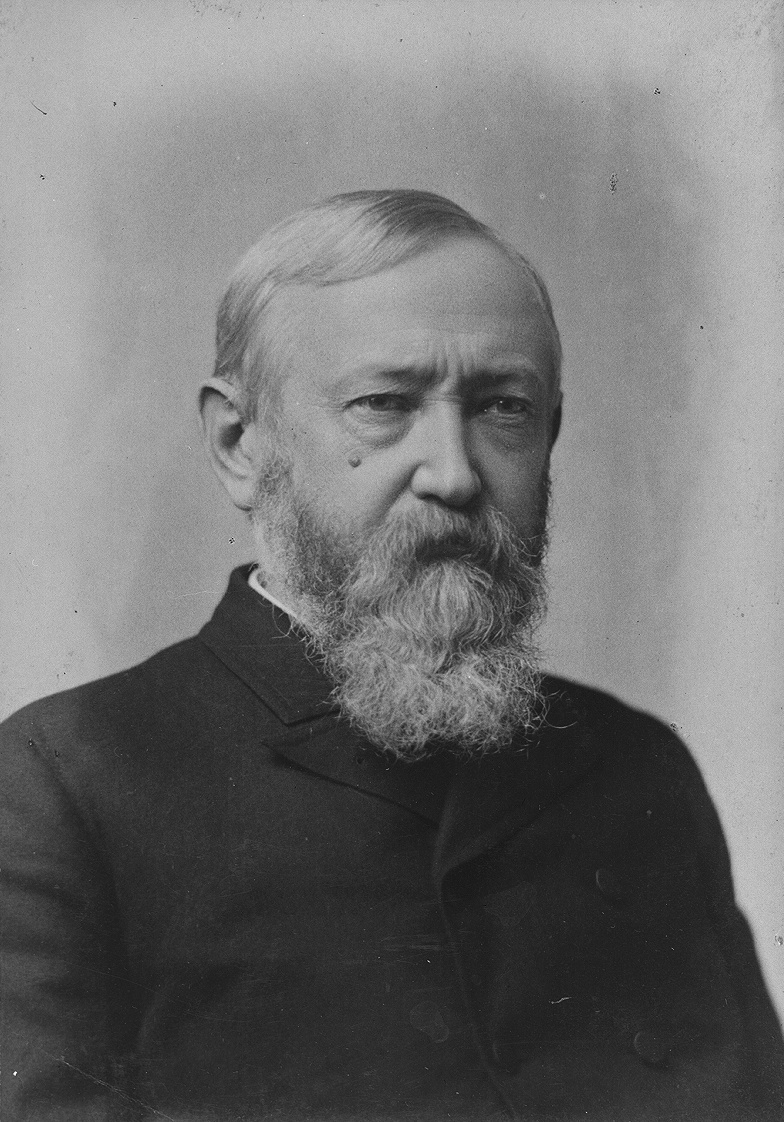 Portrait de Benjamin Harrison, 1888